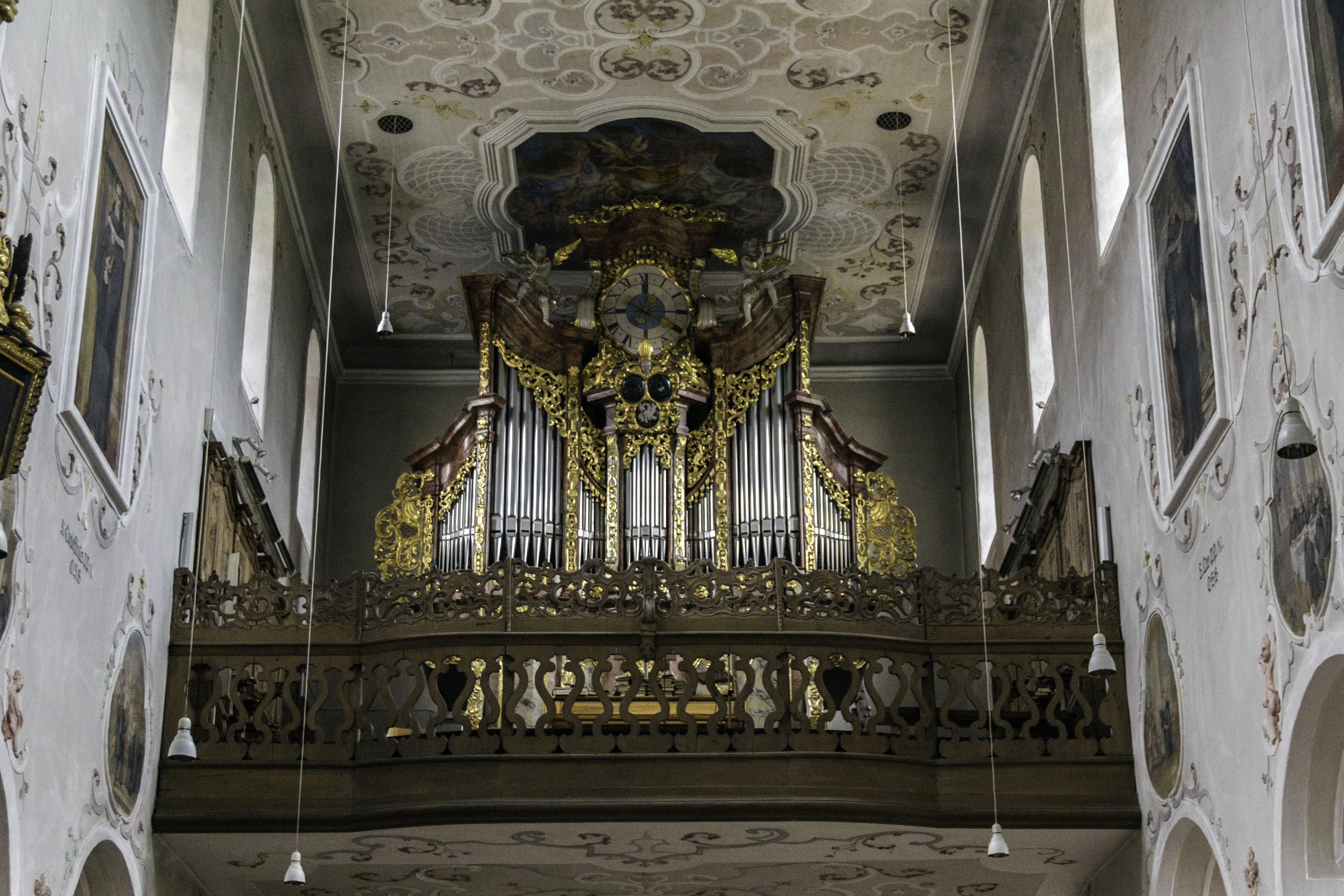 Abteikirche Mariä Himmelfahrt (Plankstetten), Orgel